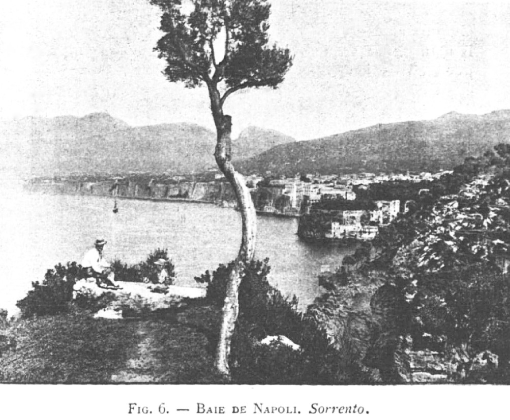 Baie de Napoli, Sorrento (James Condamin), tirée du livre "Du Vésuve à l'Etna", J. de Beauregard, 1895.